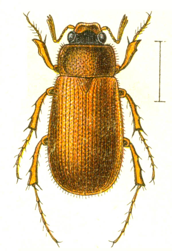 Fauna Germanica. Die Käfer des Deutschen Reiches. I. & II. Band. Farbendrucktafeln von Dr. K.G. Lutz. K.G. Lutz' Verlag, Stuttgart 1908